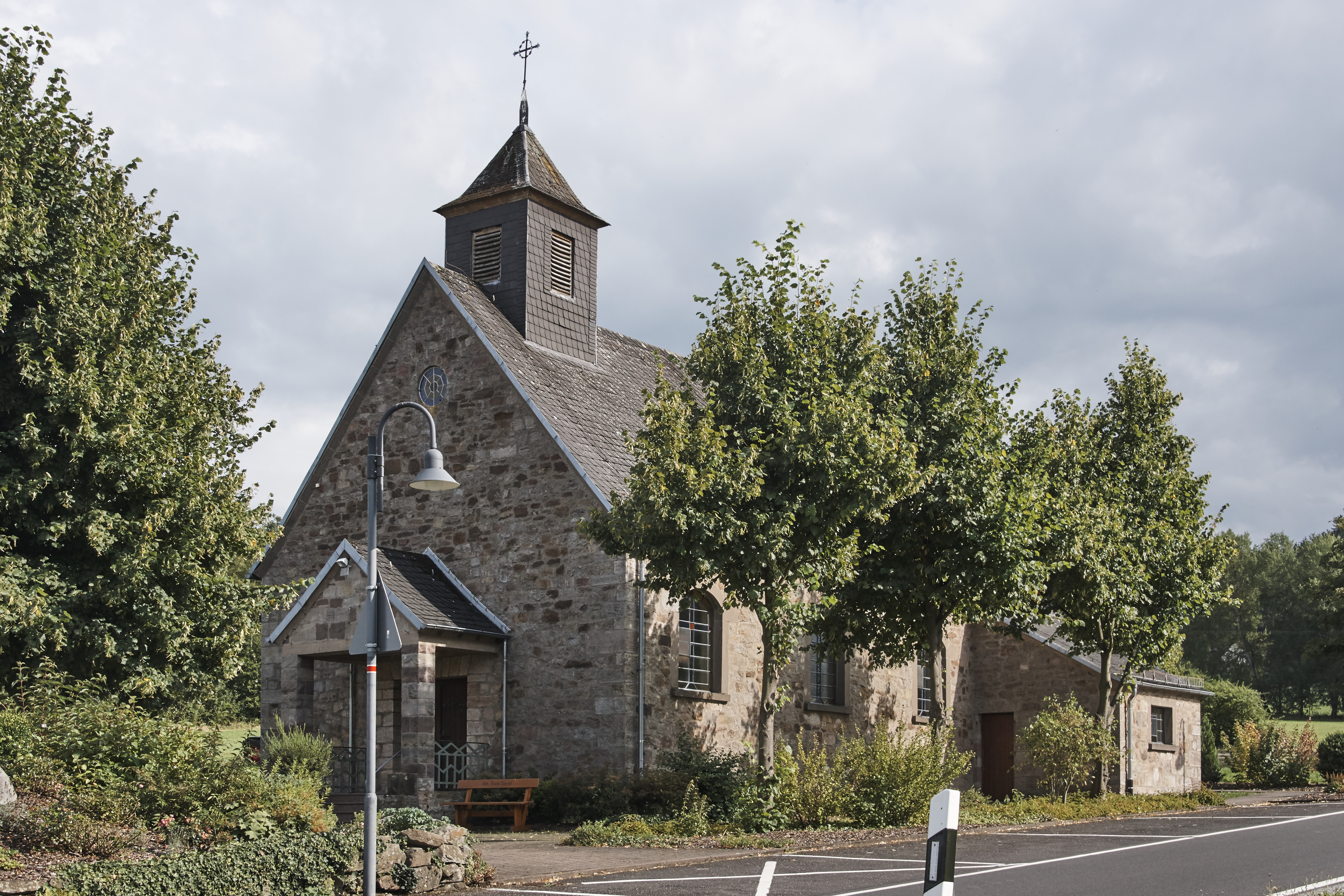 Filialkirche "Maria Heimsuchung" in Ebersberg. Davor die Mariengrotte.